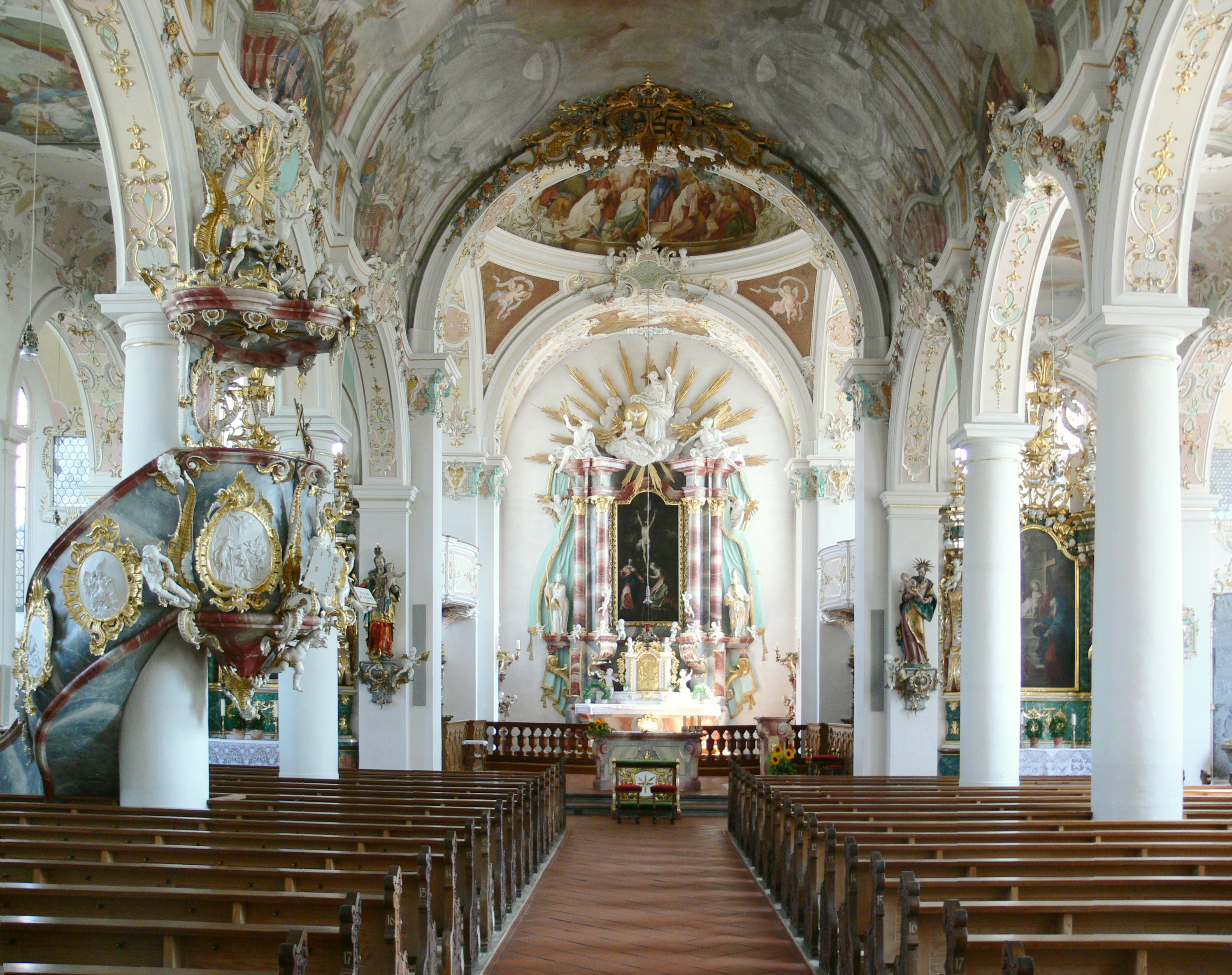 Pfarrkirche St. Gallus und Ulrich: Innenraum Kißlegg, Kreis Ravensburg, Baden-Württemberg, Deutschland